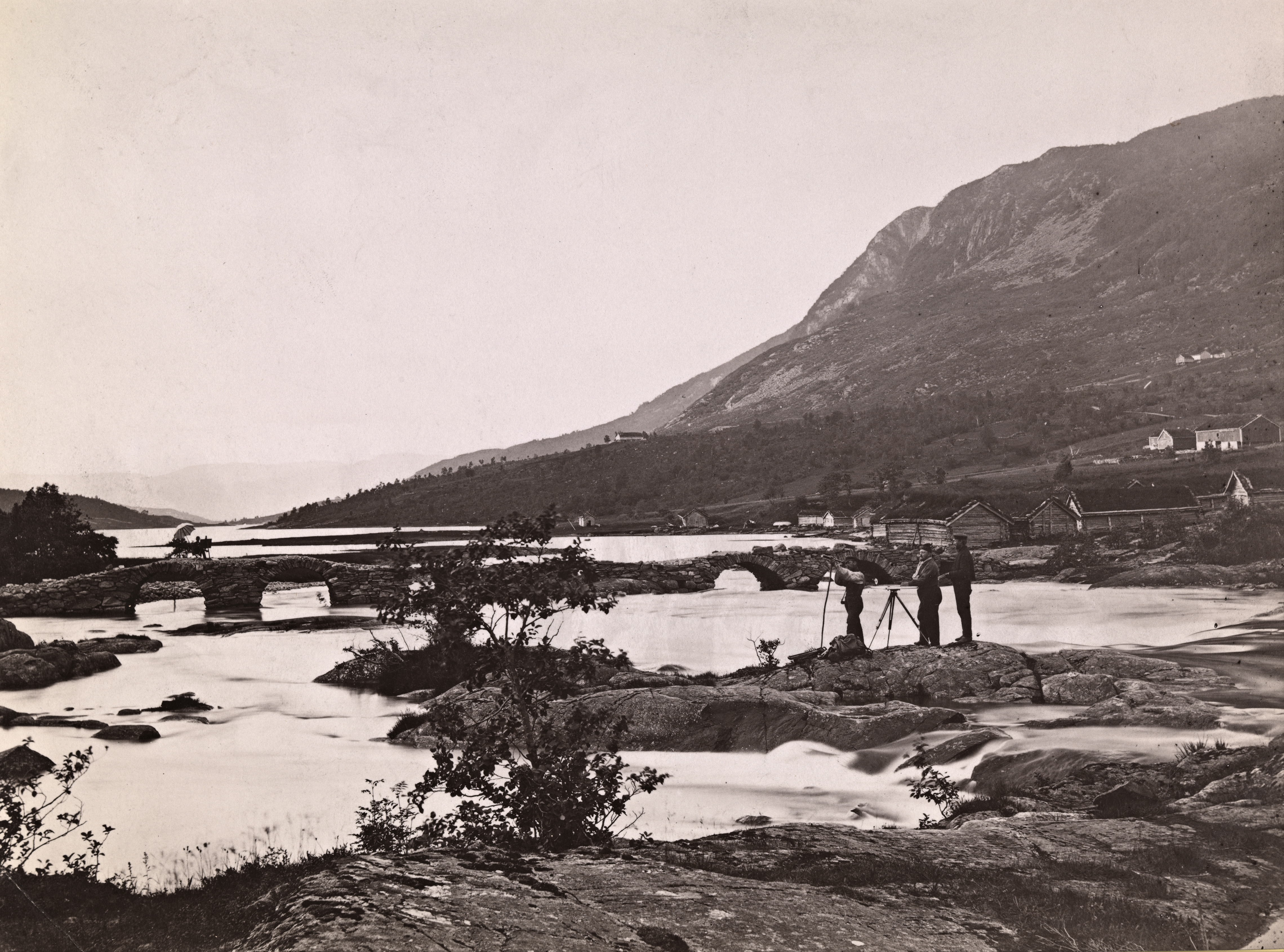 Beskrivelse / Description: På broa til venstre i bildet sitter det en og maler. Til høyre i bildet driver 3 menn med landmåling. Dato / Date: 1869 Sted / Place: Møre og Romsdal, Sykkylven. Kommentar: Trolig bro over elven Straumen som renner fra Fitjavatnet til Sykkylvsfjorden. Fotograf / Photographer: Marcus Selmer (1819-1900) Digital kopi av original / Digital copy of original: s/h papirpositiv Eier / Owner Institution: Nasjonalbiblioteket / National Library of Norway Lenke / Link: Bildesignatur / Image Number: bldsa_FA0593